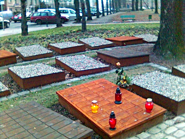 Część Pomnika Państwa podziemnego, Poznań